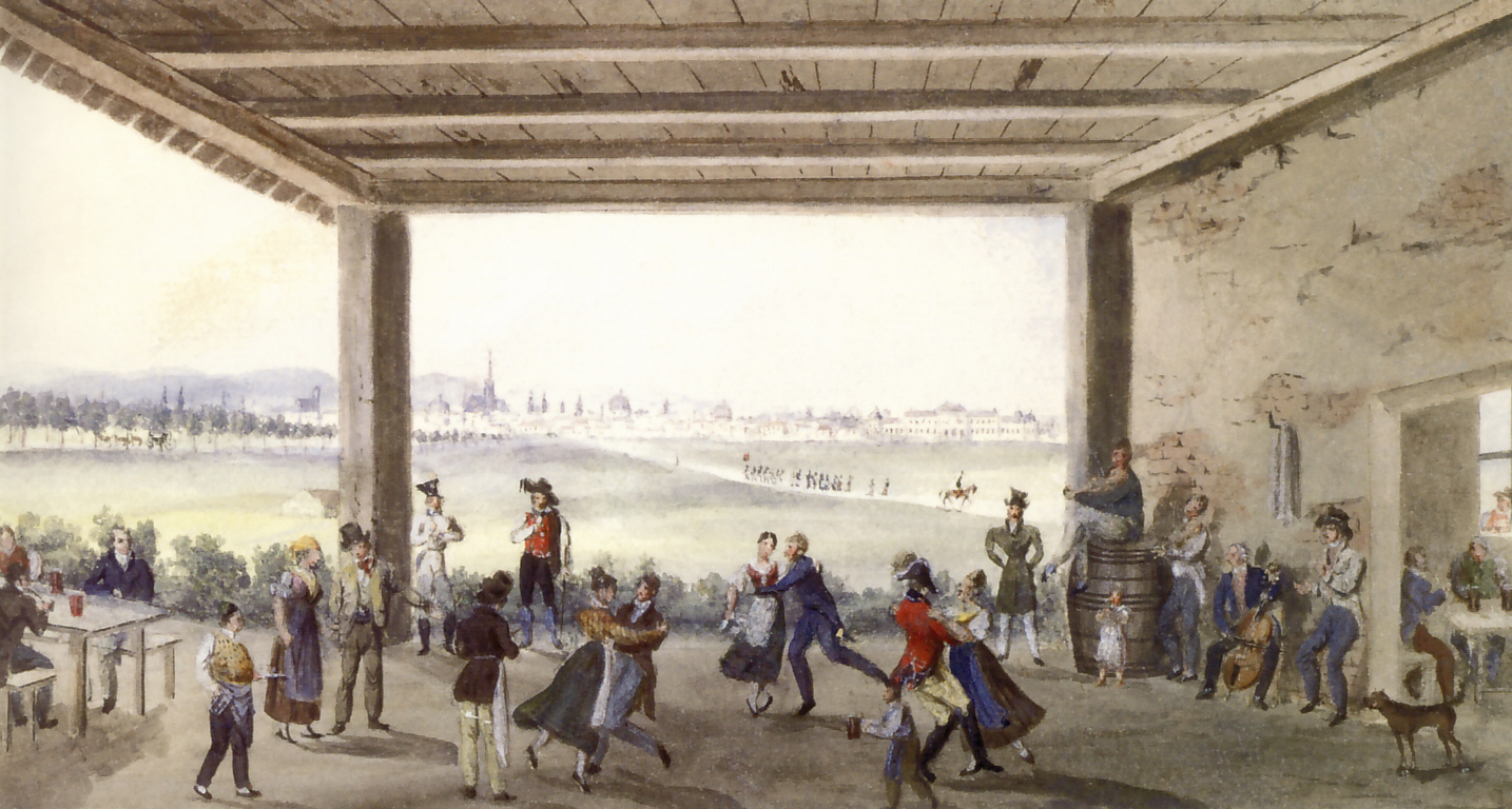 Tanz im Wirtshaus am Fortifikations-Ziegelschlag (späteres Altes Landgut)